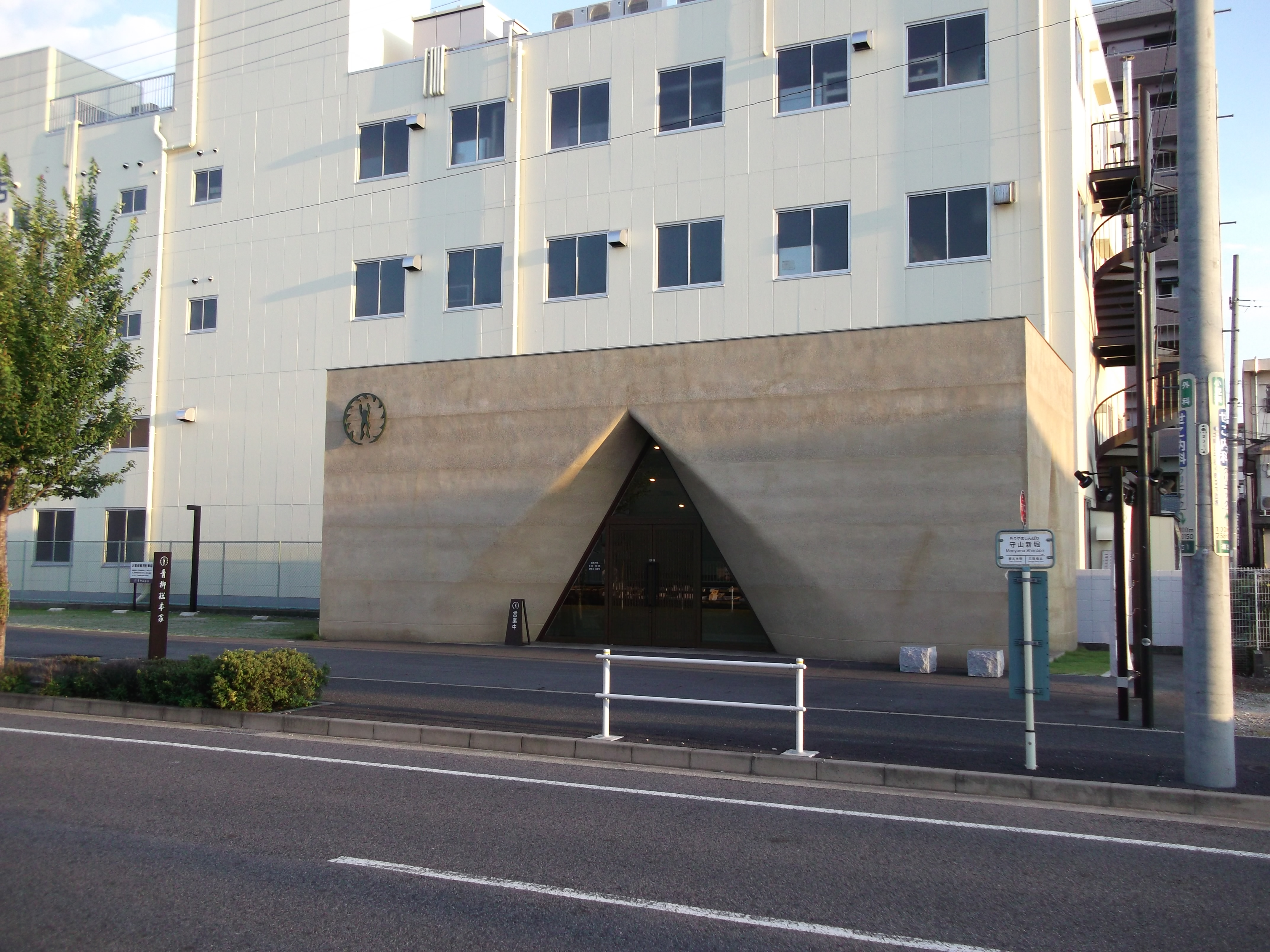 名古屋市守山区の青柳総本家守山直売所を北側公道西側より撮影。